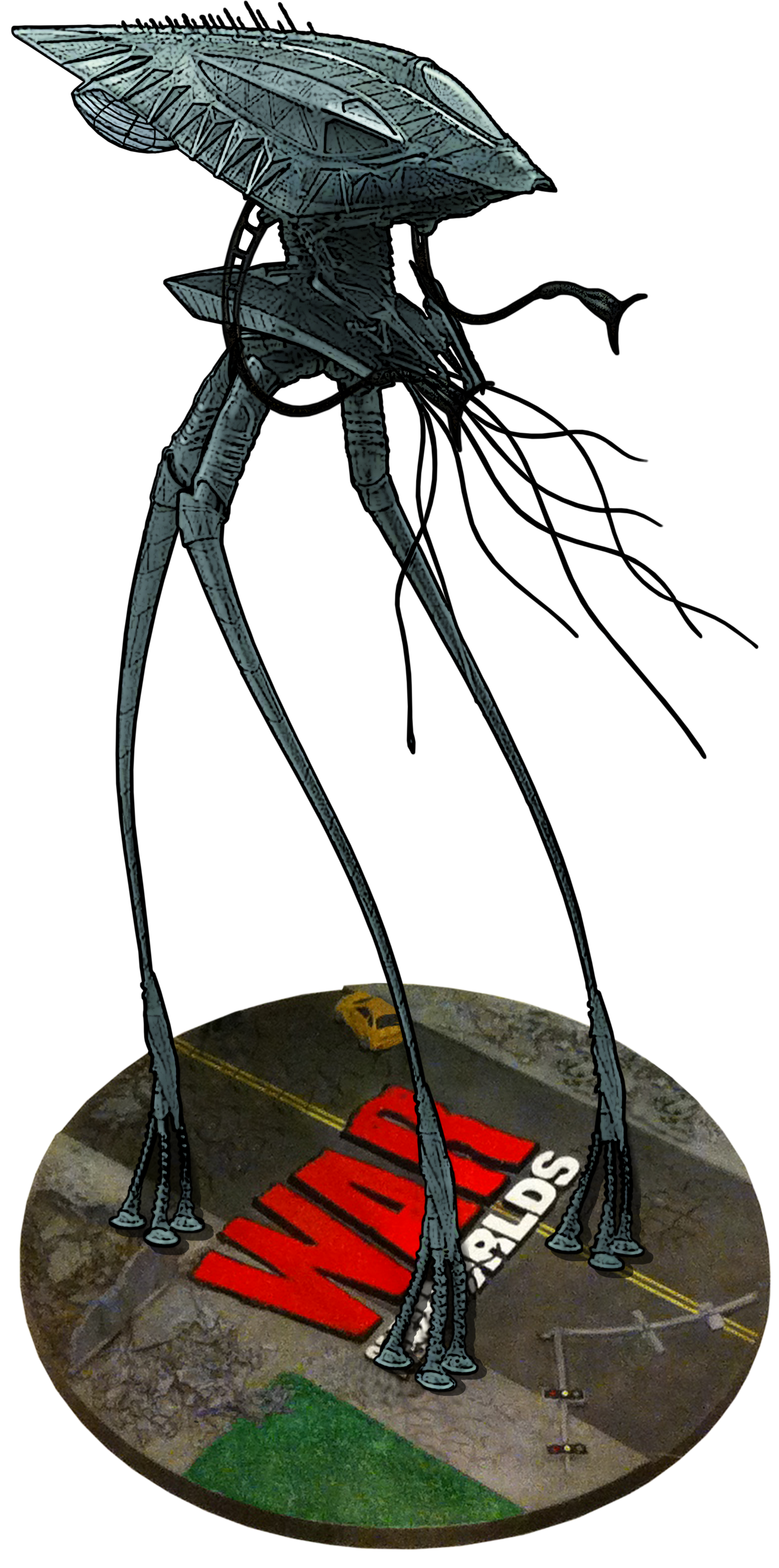 I tripodi sono macchine aliene di un pianeta remoto e sconosciuto. Hanno uno scudo che li protegge dagli attacchi.Sono dotati di due piccole braccia dalle quali sparano un raggio di calore e quando colpisce un essere umano ne distrugge il corpo ma non i vestiti.I tripodi utilizzano inoltre un particolare braccio meccanico con il quale infilzano un essere umano e lo prosciugano del loro sangue per spruzzarlo nell'atmosfera e far crescere una pianta rossa e trasformare la Terra come il loro pianeta di origine.